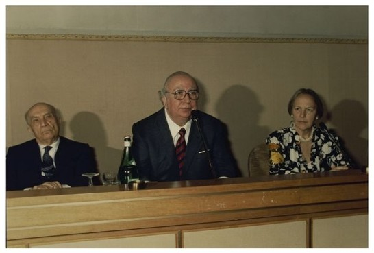 30° Anniversario della morte di Giuseppe Romita